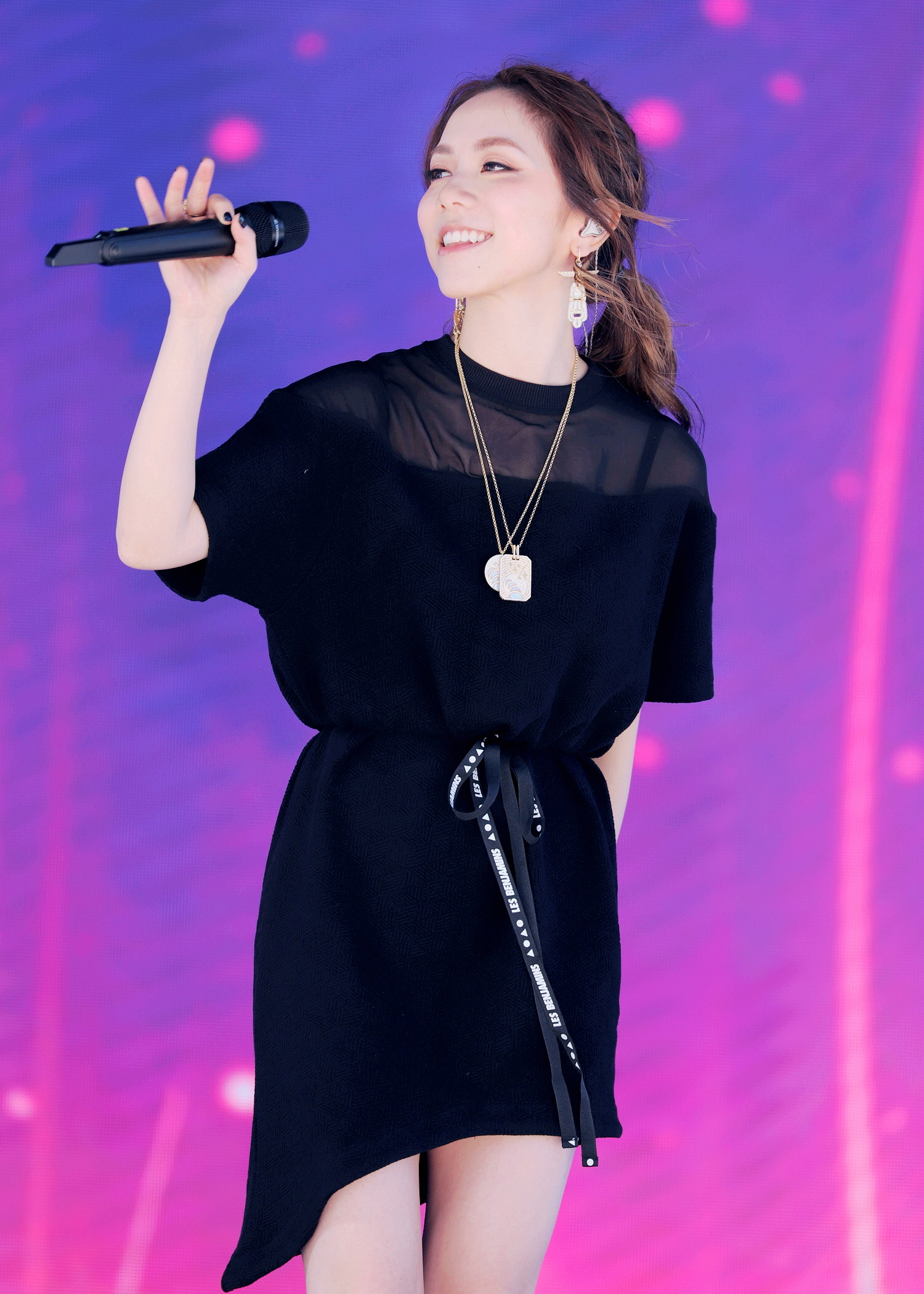 2018.09.22 大连商演 邓紫棋